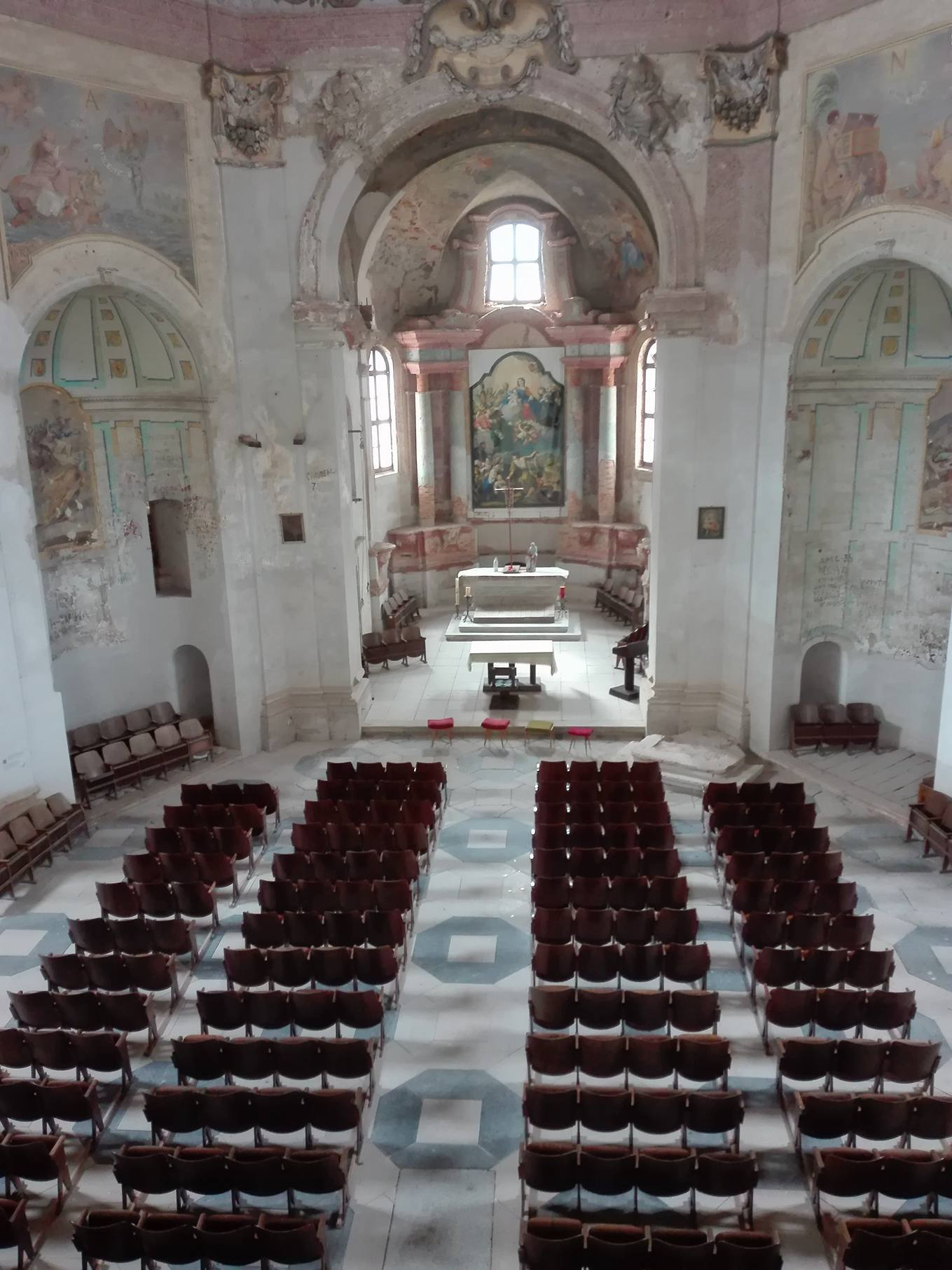 Intererier poutního kostela sv.Anny na Staré Vodě